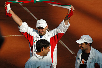 Щастливият капитан Ивайло Трайков :) Да не забравяме огромният му принос за решаващата победа в двойките!; Пловдив, Купа Дейвис: България - Кипър 3:2; 2007 Пламен Ташев, Тенис